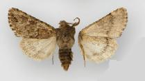 Tricholita ferrisi male